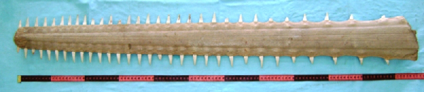 Рострум зелёного пилорыла длиной 118 см